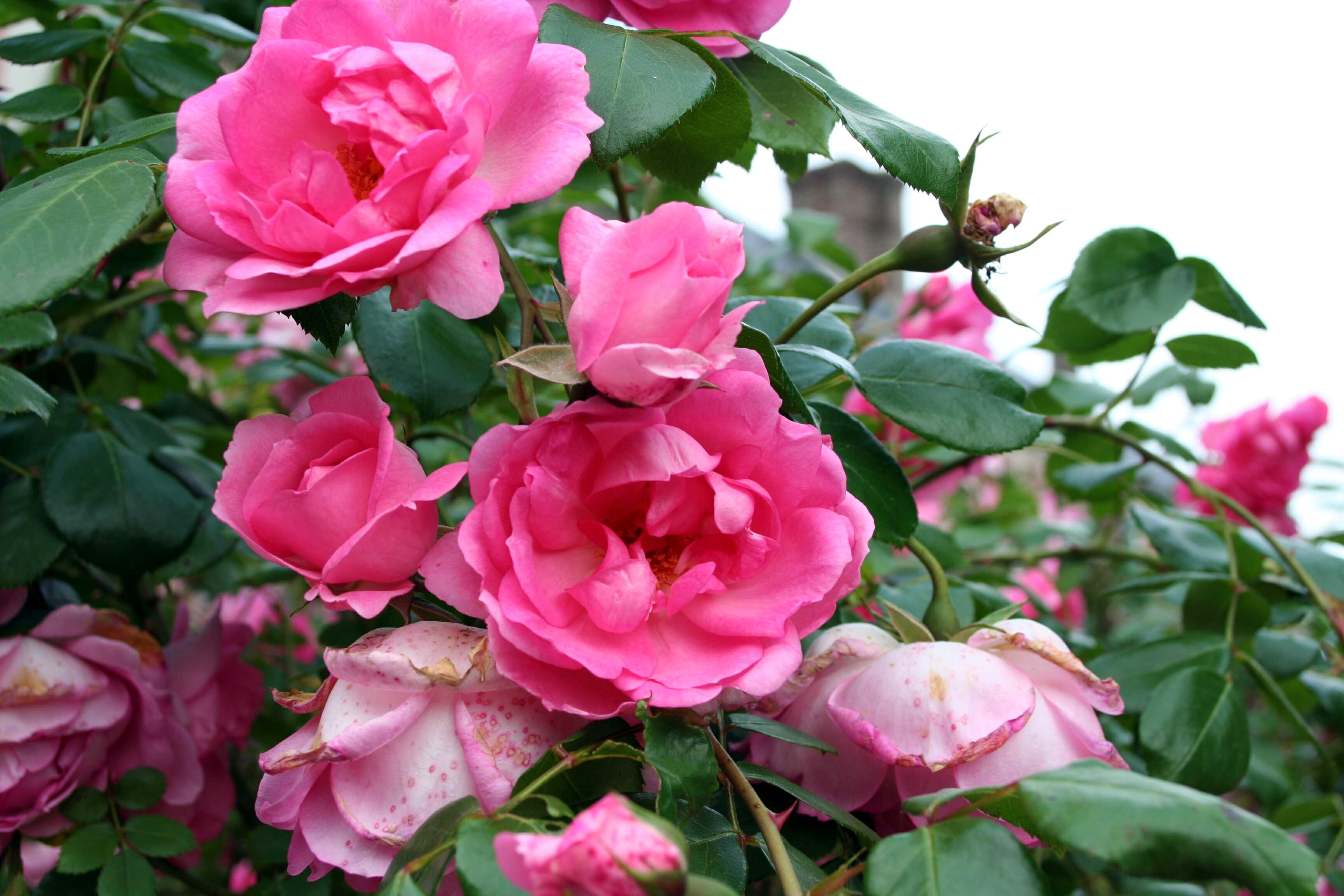 Rose 'Centenaire de Lourdes' photographiée dans le jardin de Claude Monet à Giverny - Eure (France)